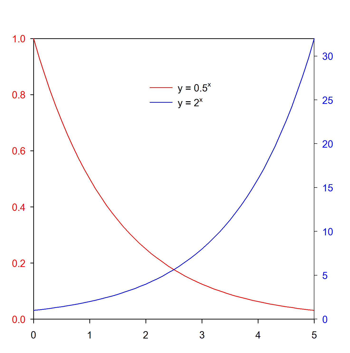 graf af eksponentiel vækst og henfald